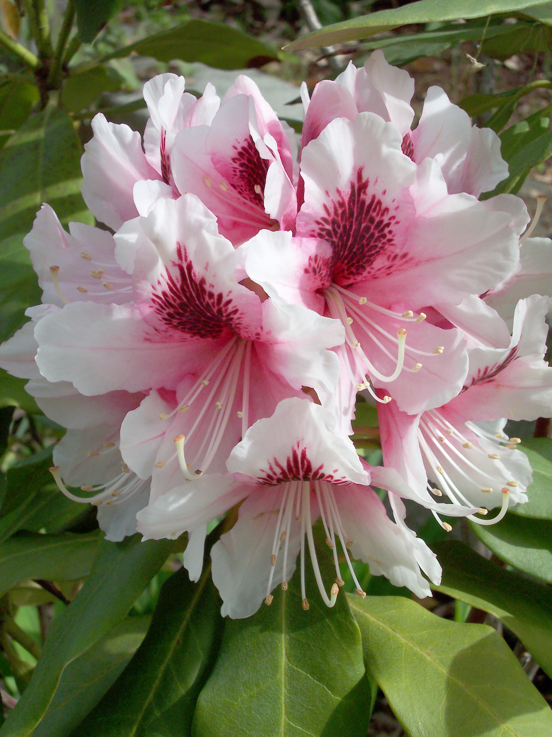 Rhododendron 'G. W. Leak'. Real Jardín Botánico de Madrid.